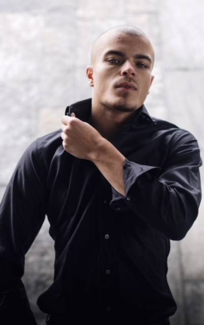 Toni Prince Tvrtkovic